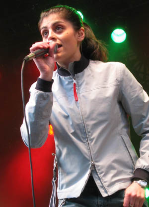 Dilba på scen